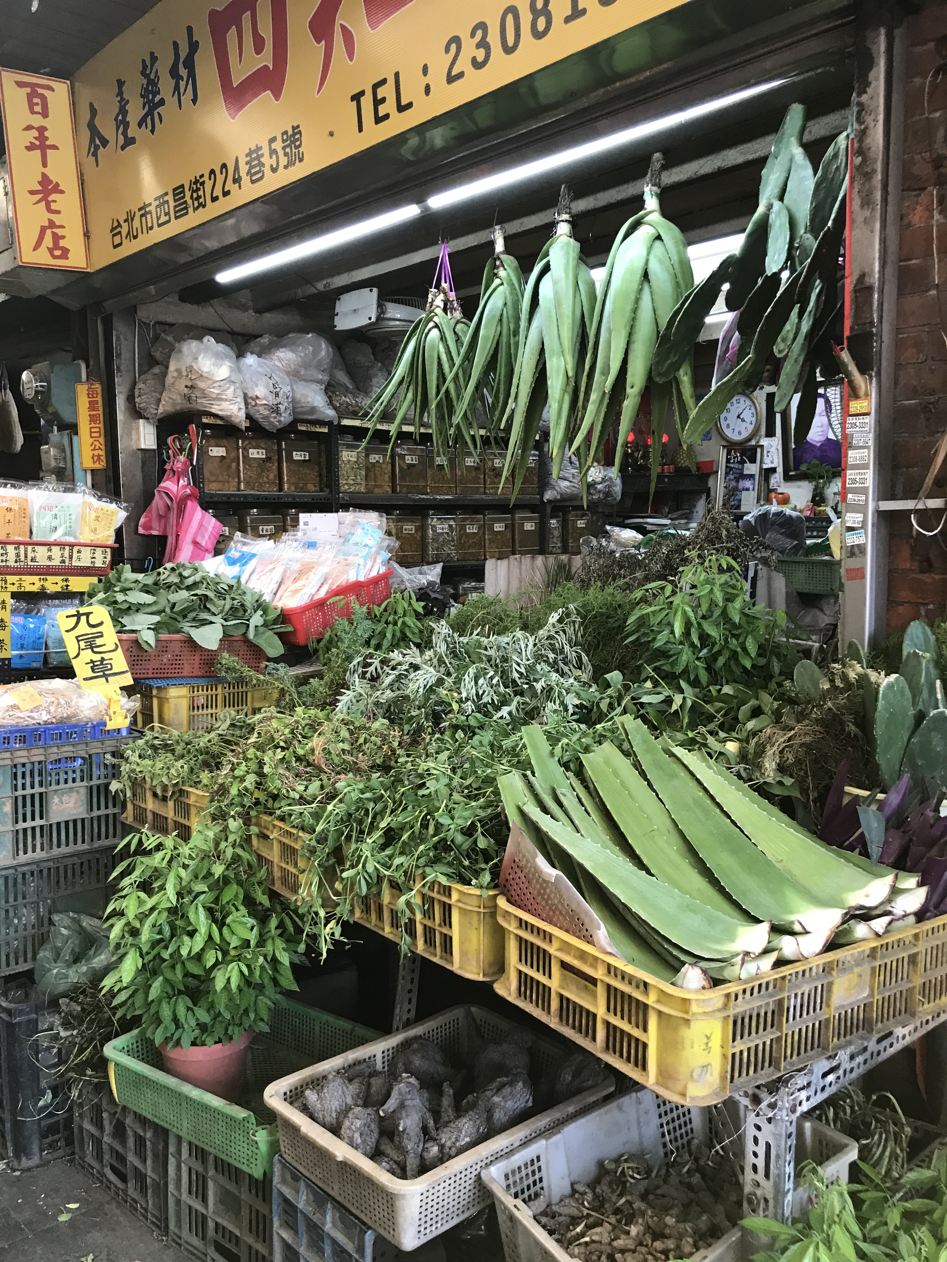 臺北萬華青草巷